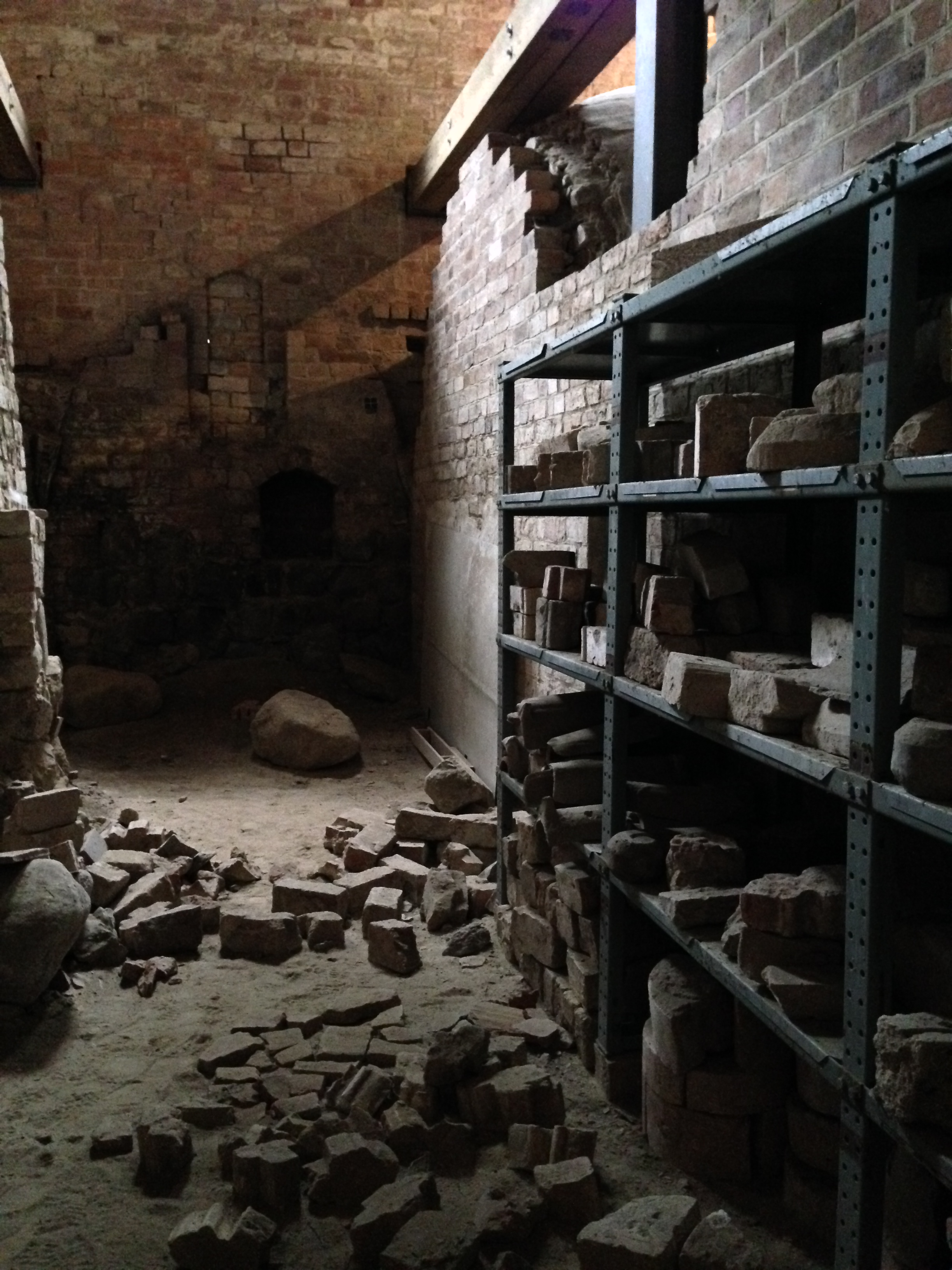 Kloster Chorin Kellergewölbe (2013)